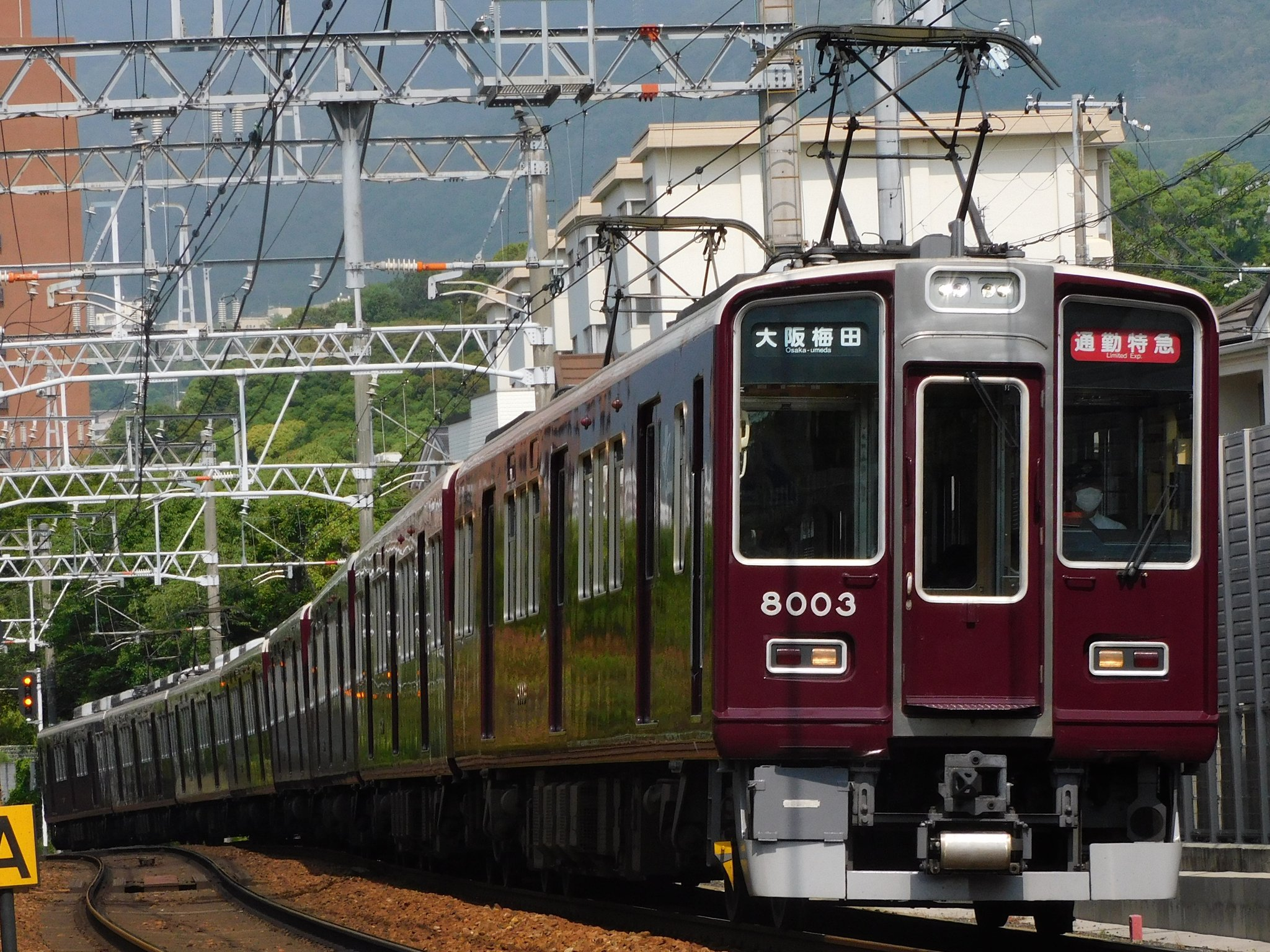 神戸線の通勤特急運用に就く阪急8003F。